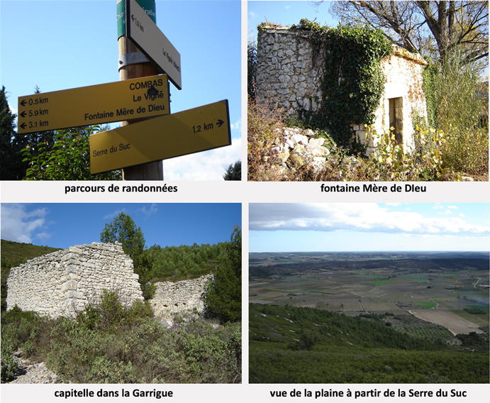 randonnées à pied, cheval ou VTT. Randonnées de Combas.